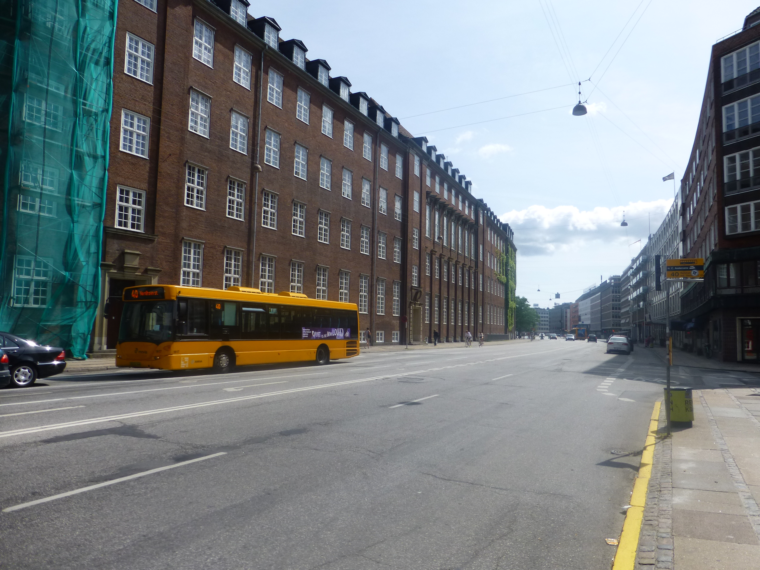 The street Vester Farimagsgade in Vesterbro in Copenhagen.